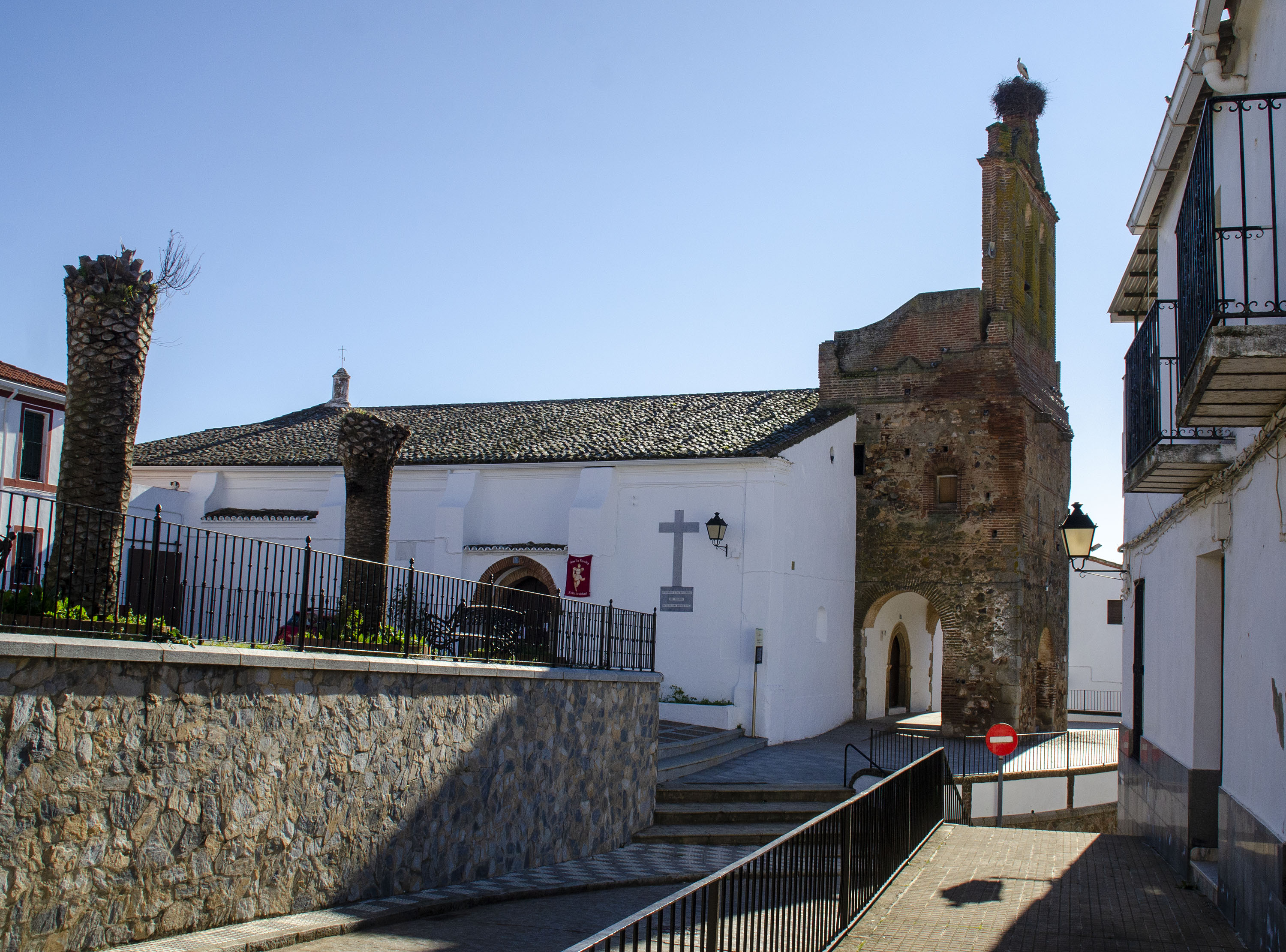 Valle de Santa Ana - Iglesia parroquial